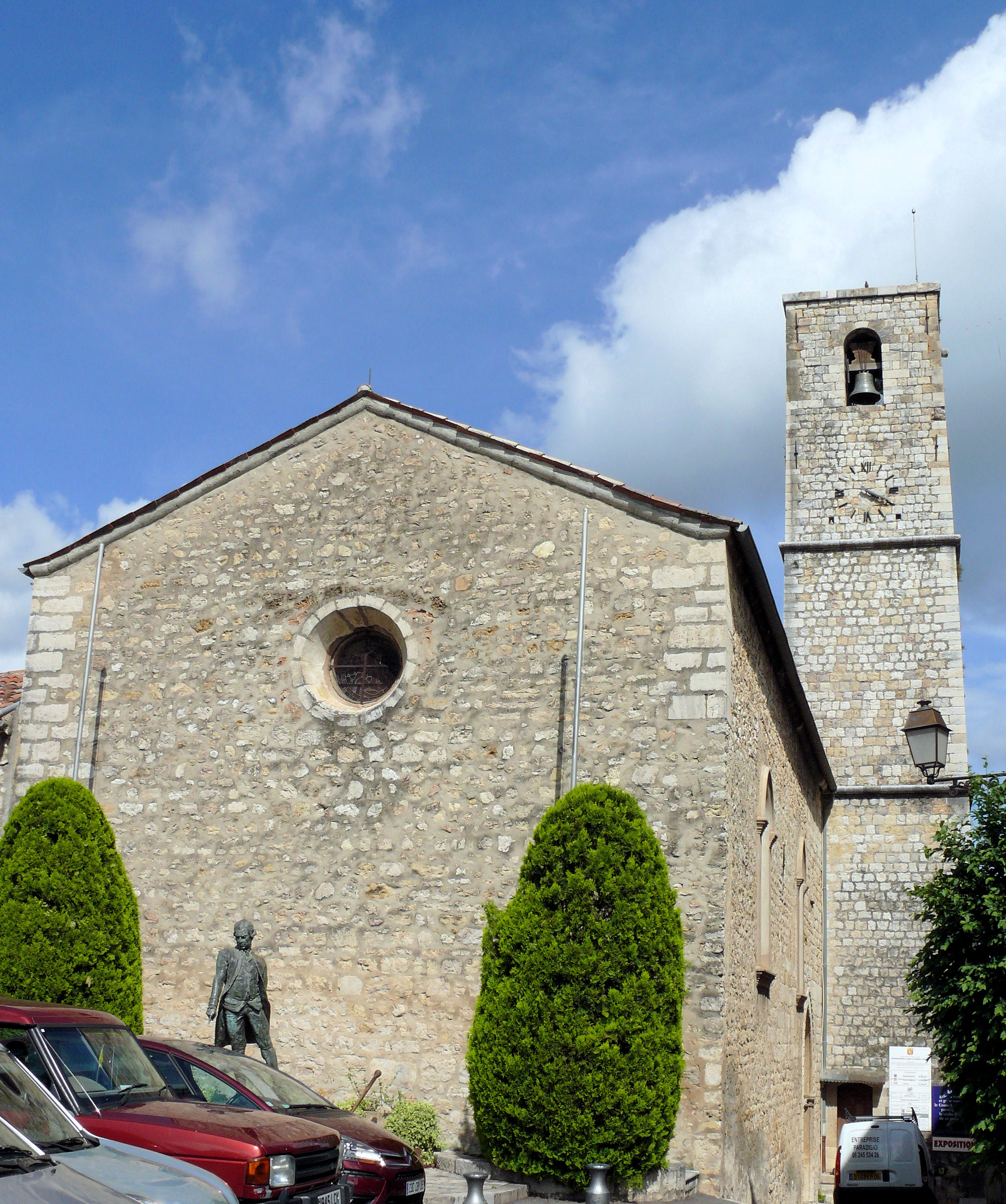 Le Bar-sur-Loup - Église Saint-Jacques-le-Majeur avec la statue du comte de Grasse .